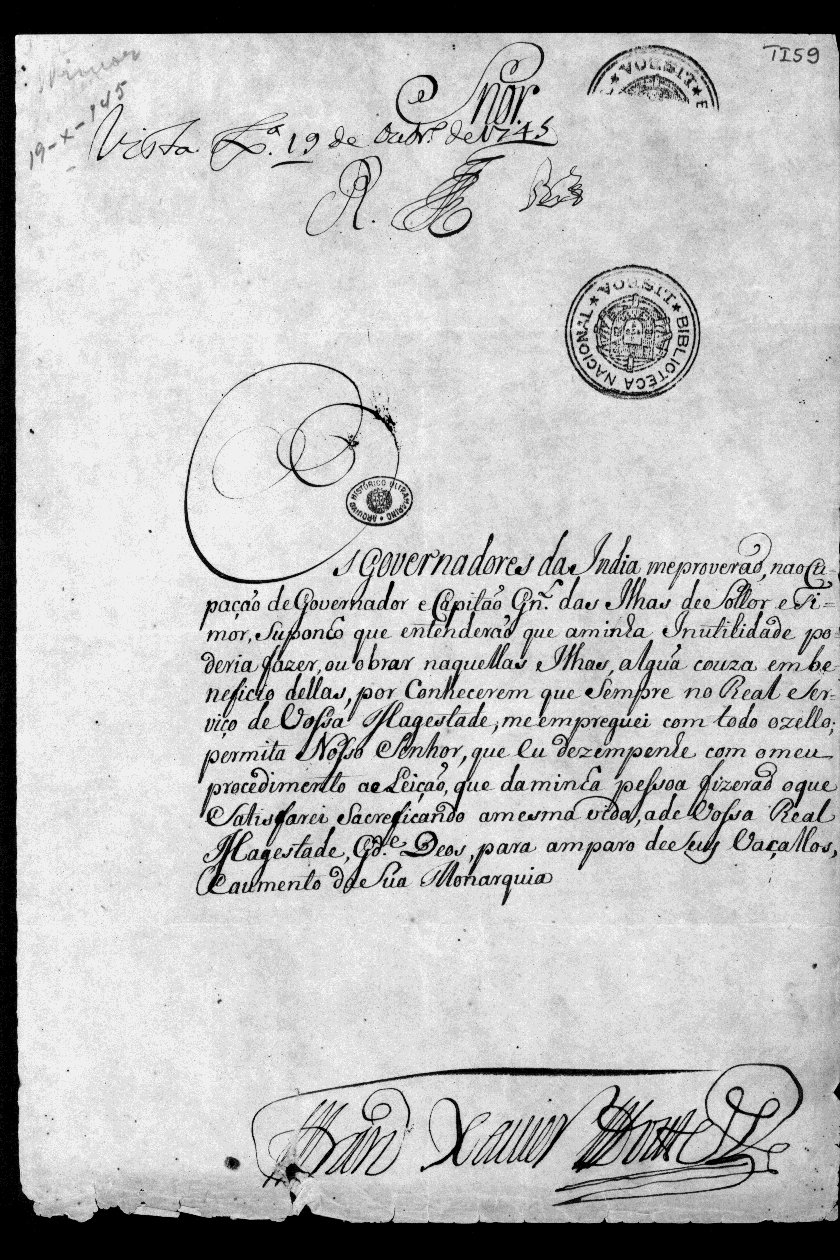 CARTA de Francico Xavier Doutel ao rei [D. João V] a pedir para ser nomeado para o cargo de governador e capitão-geral das ilhas de Timor e Solor em que foi provido pelo governador da Índia.